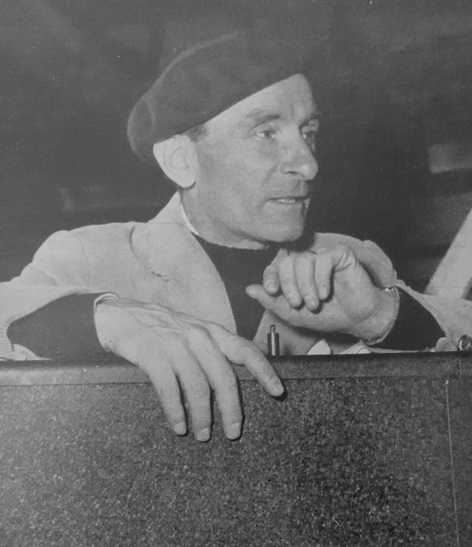 Flavio Calzavara regista